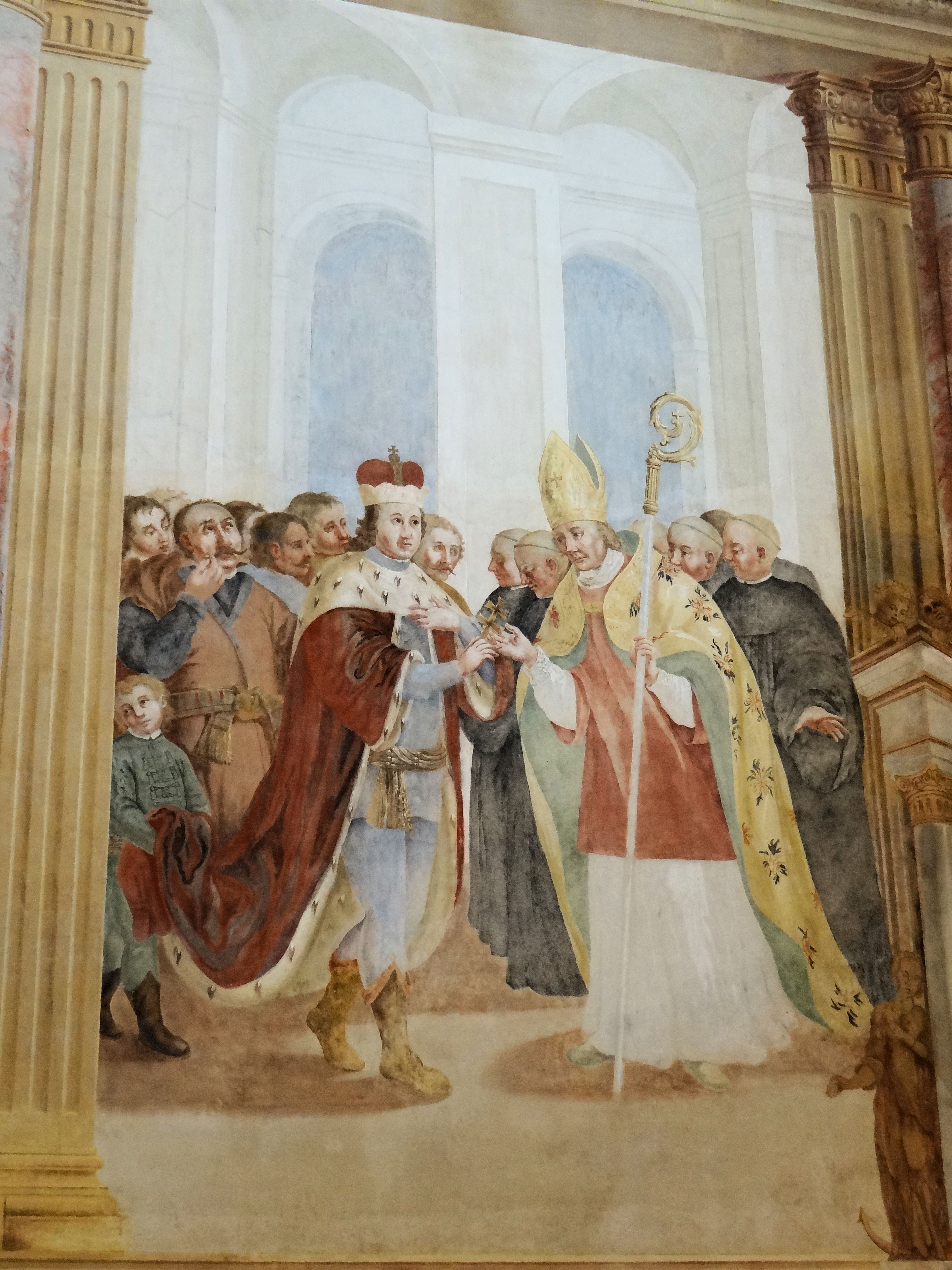 Kaplica Świętych Relikwii w Sanktuarium św Krzyża - freski na sklepieniach